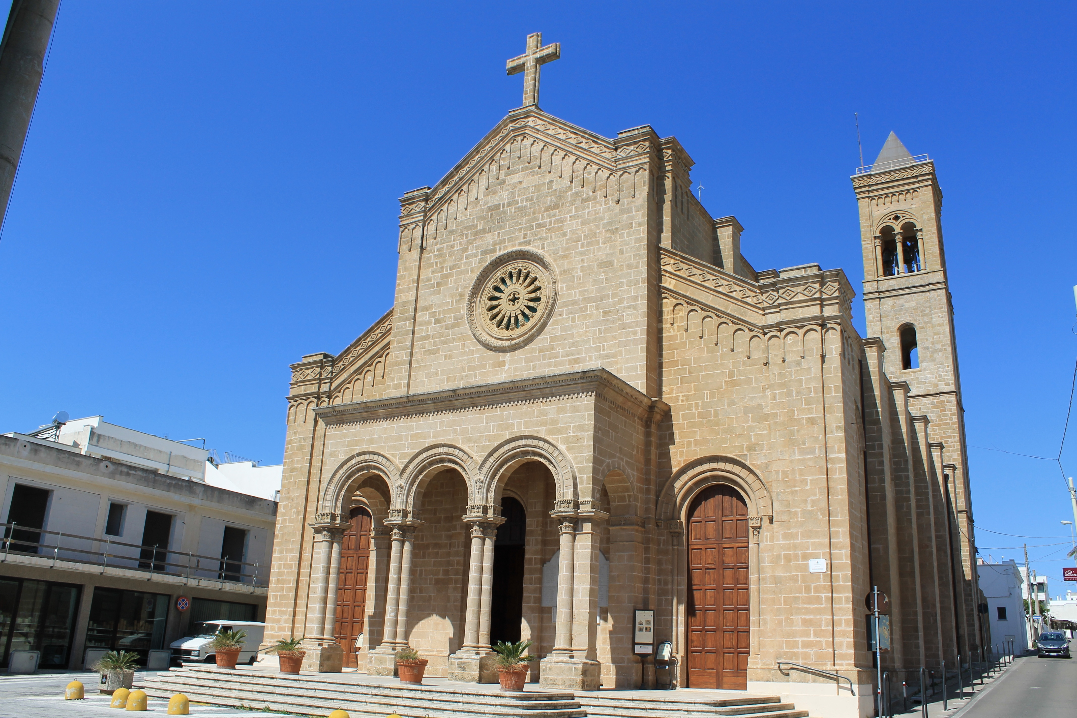 Santa Maria di Leuca, frazione di Castrignano del Capo: la Chiesa di Cristo Re.